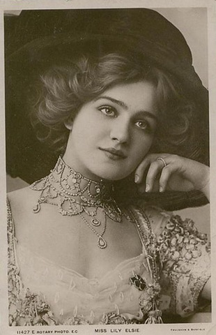 Lily Elsie, silent movie actress